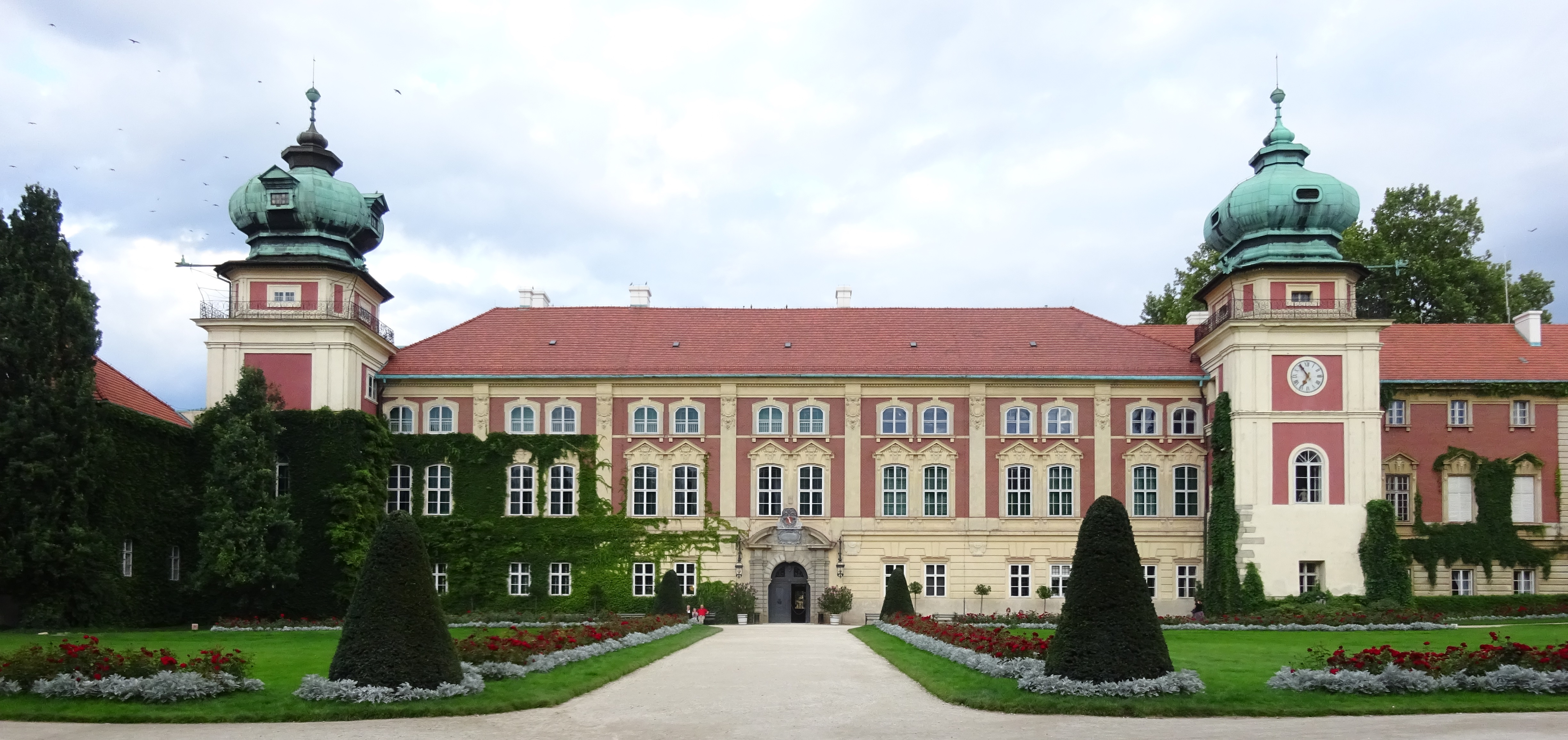 Zamek Lubomirskich i Potockich w Łańcucie. Widok od Frontu, 2016.